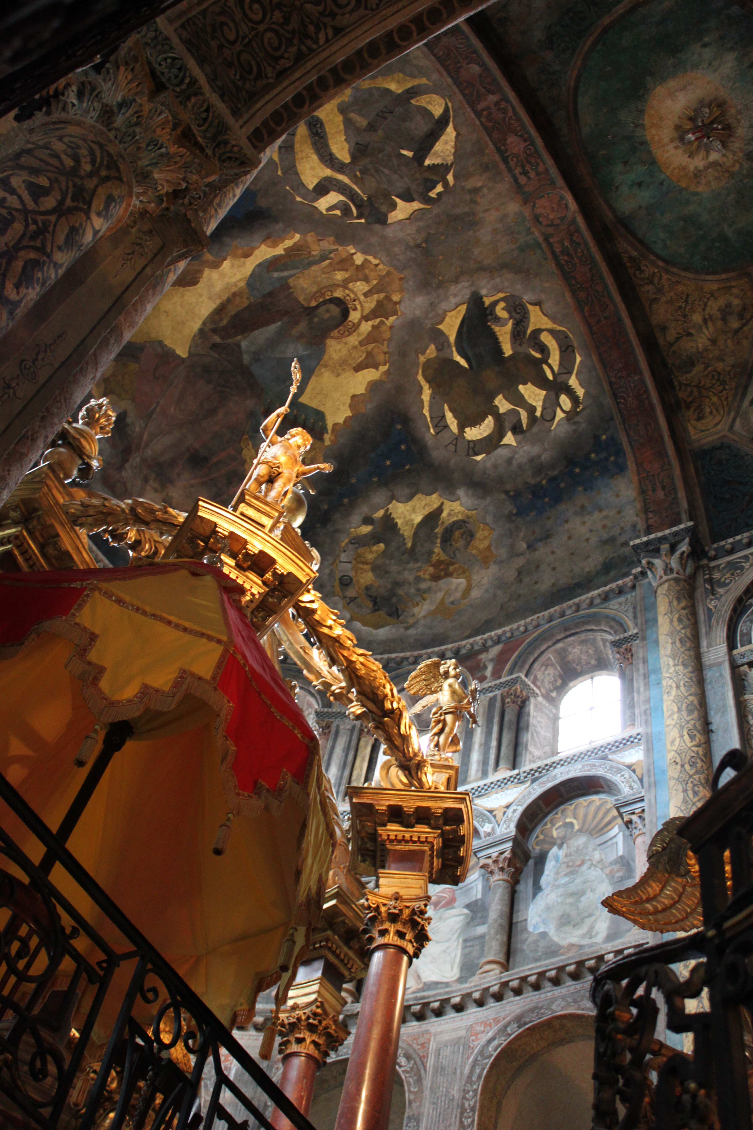 St Sernin